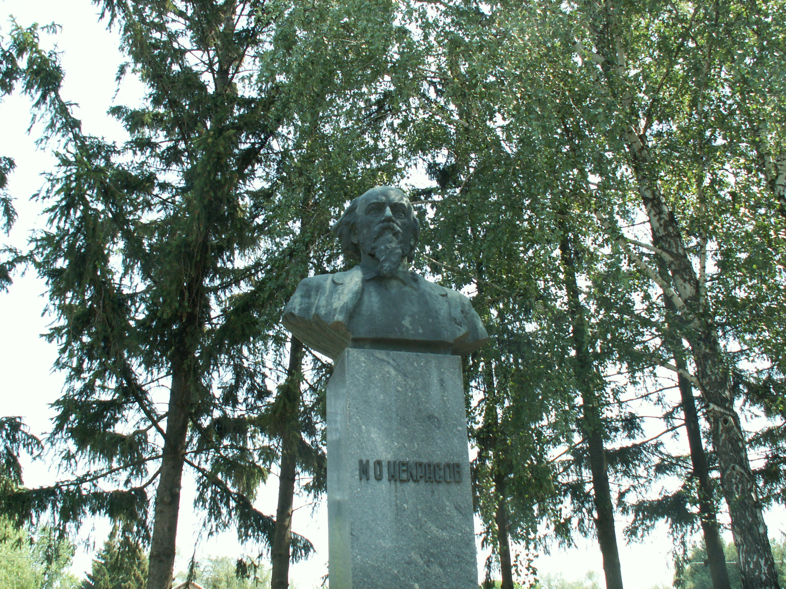 Nemyriv_Ukraine_Nekrasov_Memorial